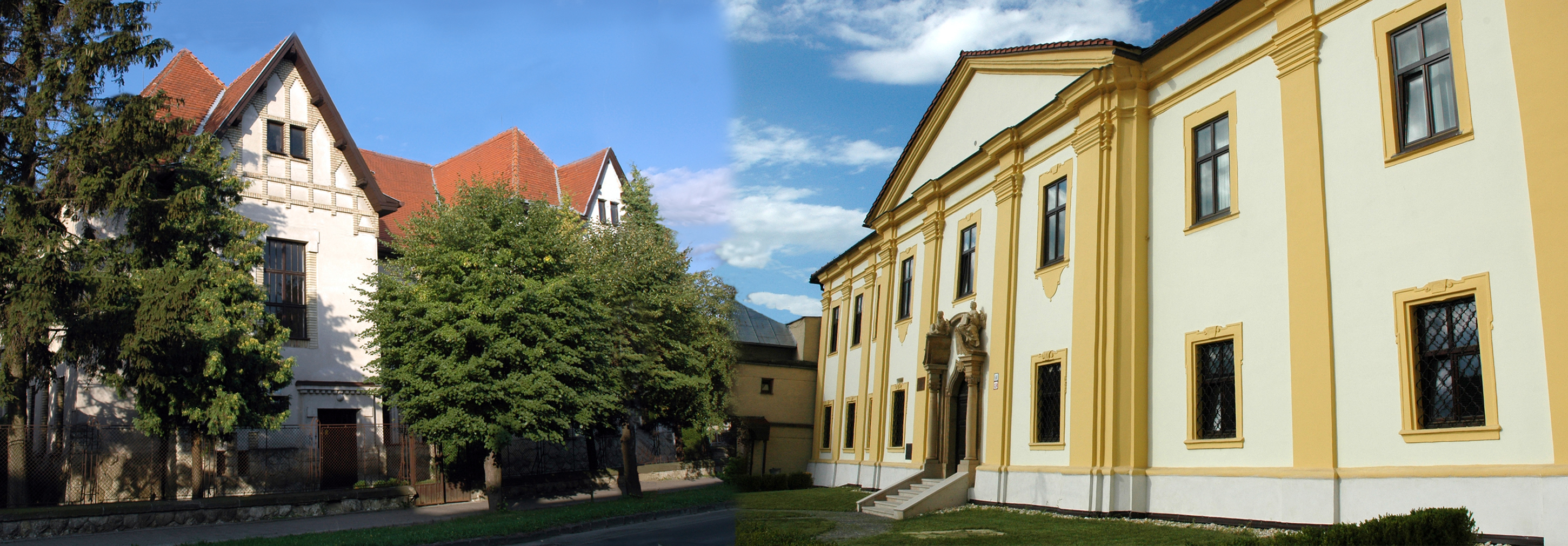 Budova v ľavo je súčasné sídlo okresného súdu vo Vranove a budova v pravo sídlila túto inštitúciu do roku 1911. Dnes je to kláštor pavlínov.